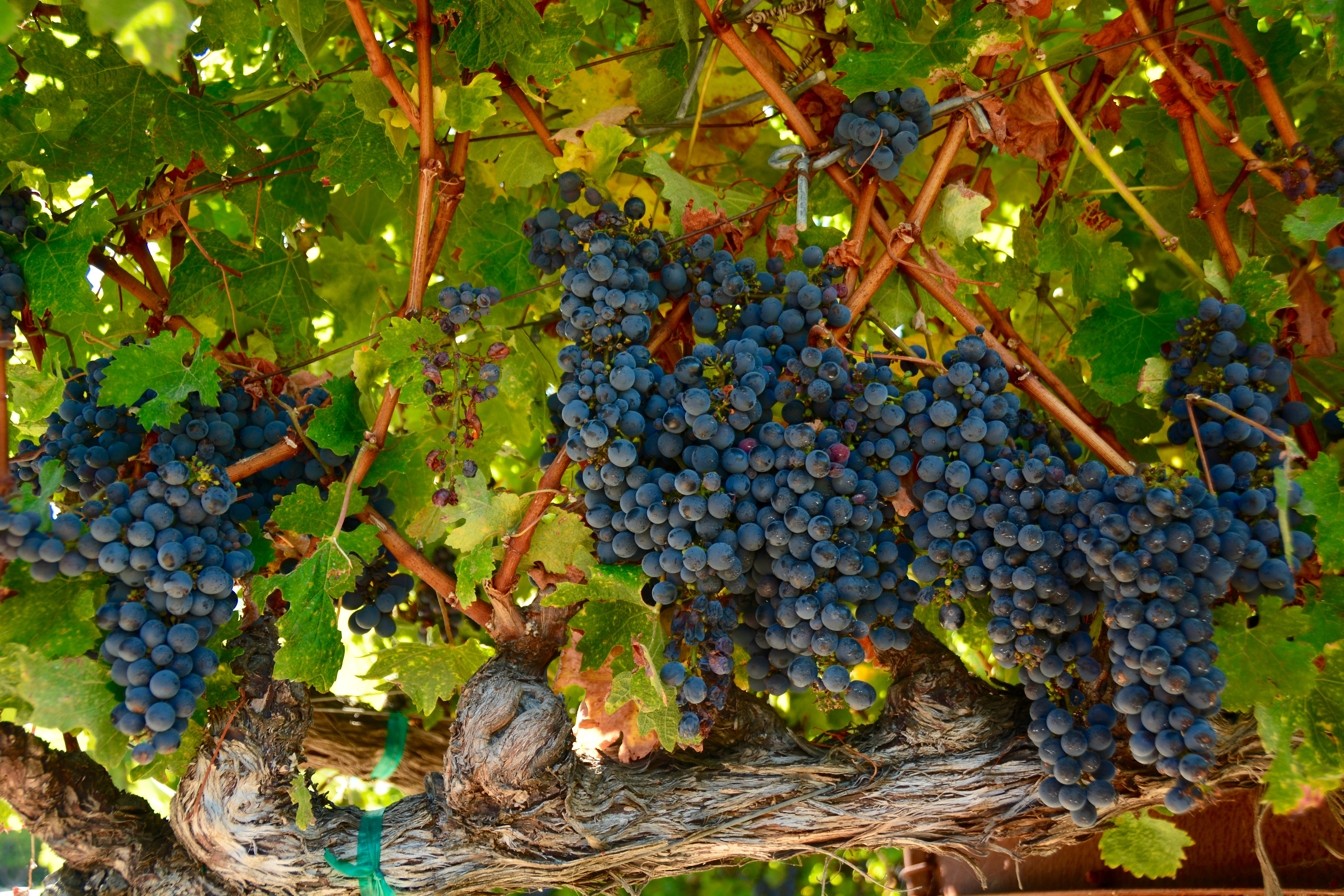 Edna valley